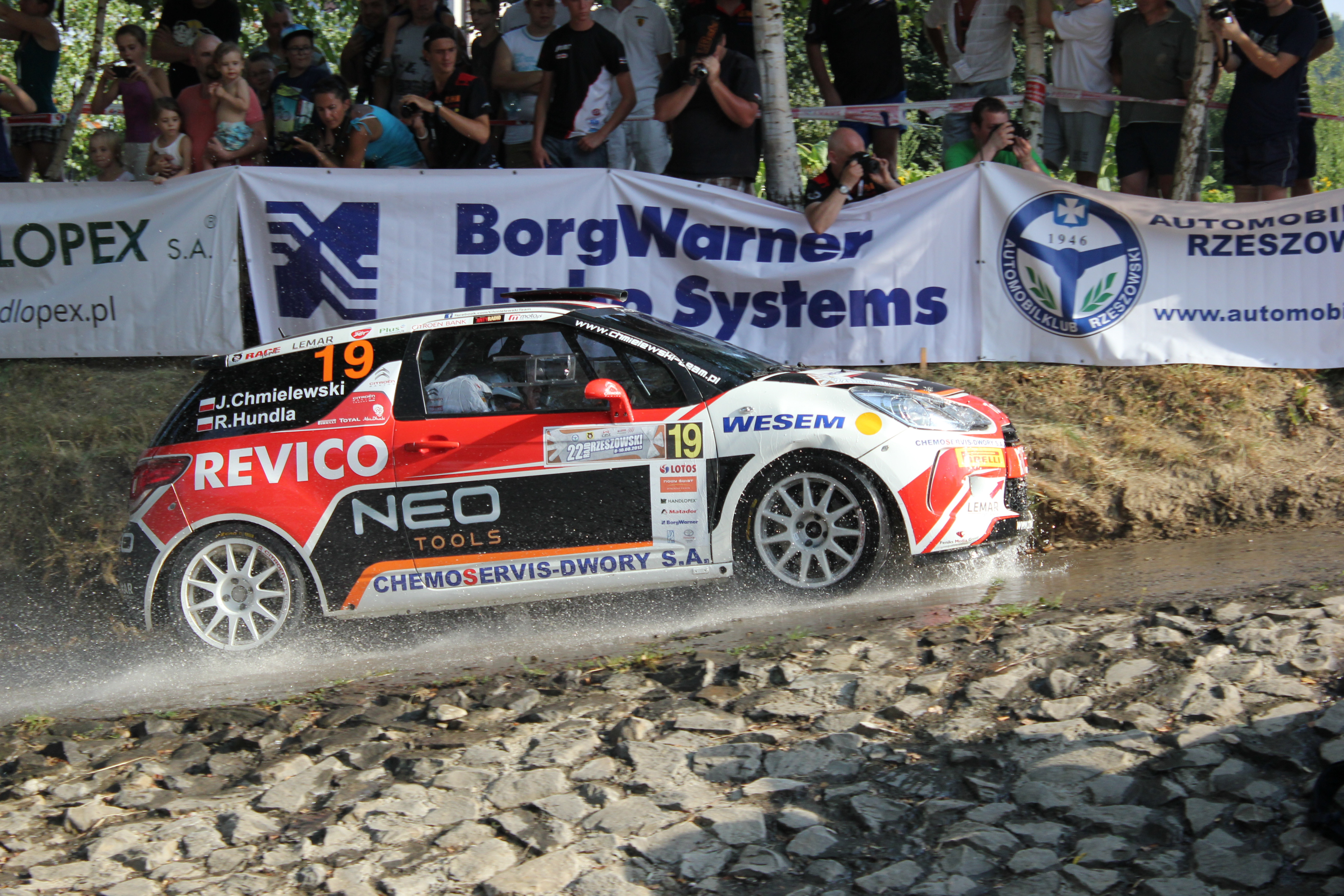 Janek Chmielewski podczas Rajdu Rzeszowskiego - 2013 rok